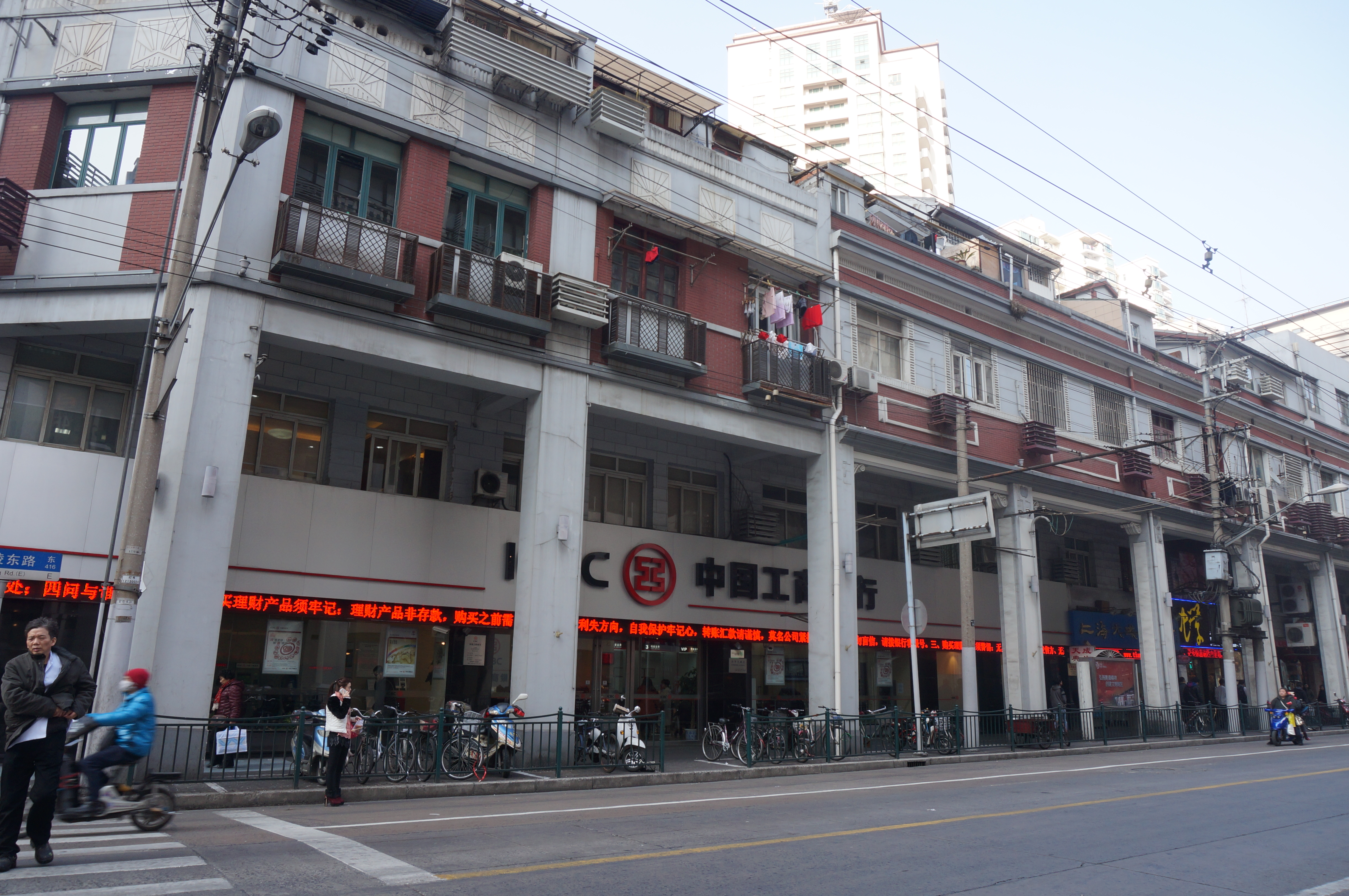 上海金陵东路上的骑楼；金陵东路 云南南路至广西南路段，近余庆里